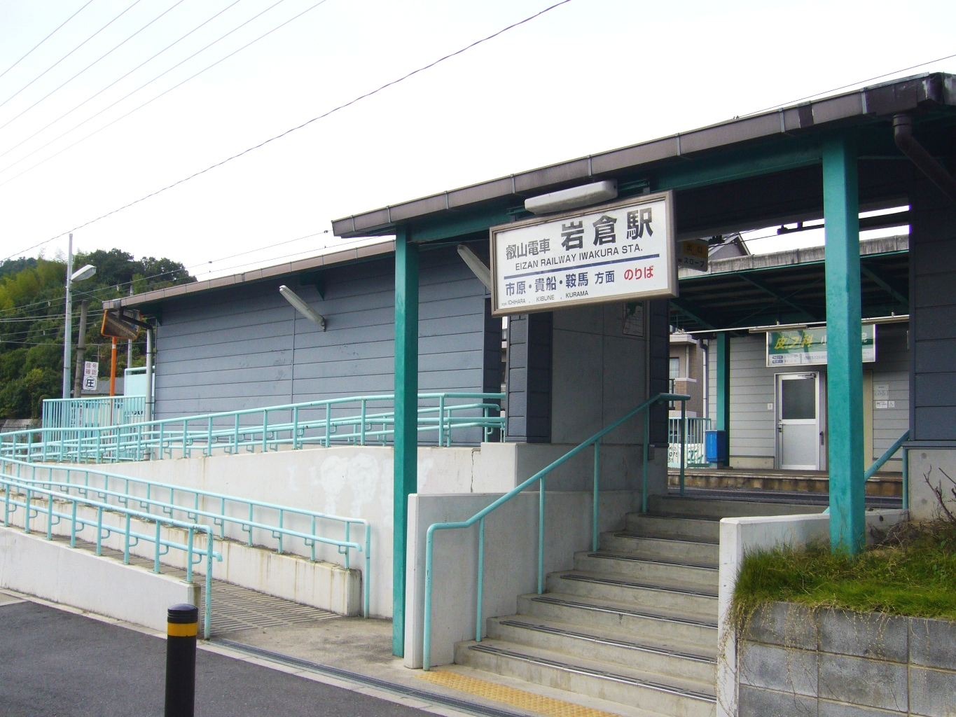 叡山電鉄鞍馬線岩倉駅の鞍馬駅方面行きホームの出入り口。反対行きホームとともにスロープが完備されている。2007年10月13日に投稿者が撮影。